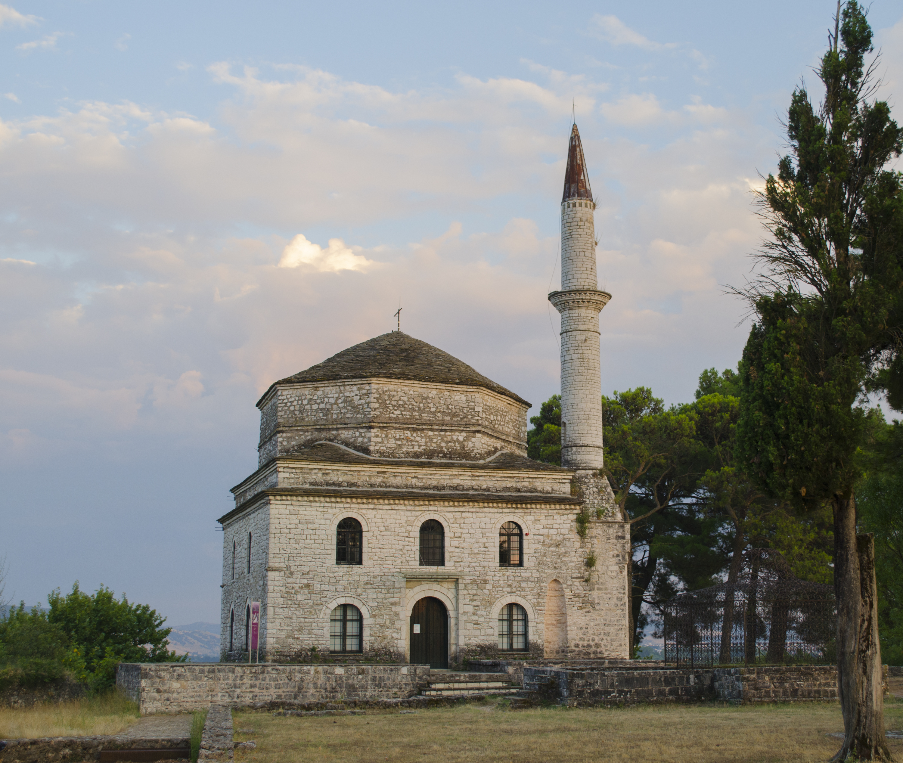 Φετιχέ τζαμί και ο τάφος του Αλή Πασά στην ακρόπολη του Ιτς Καλέ«Μαστιλίτσα»